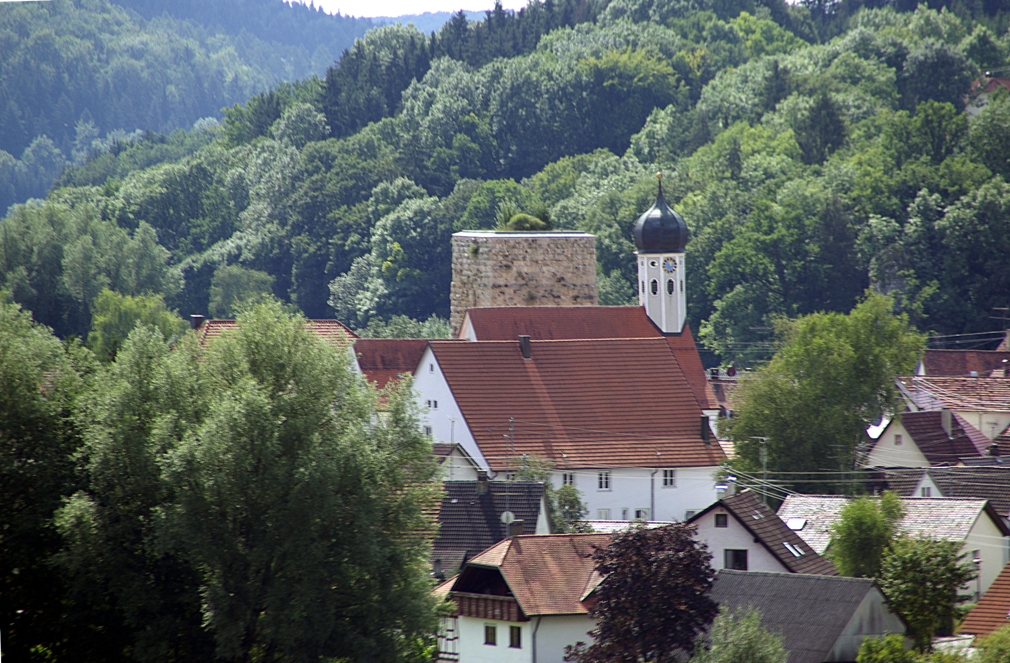 Blick auf den alten Jungnauer Ortskern